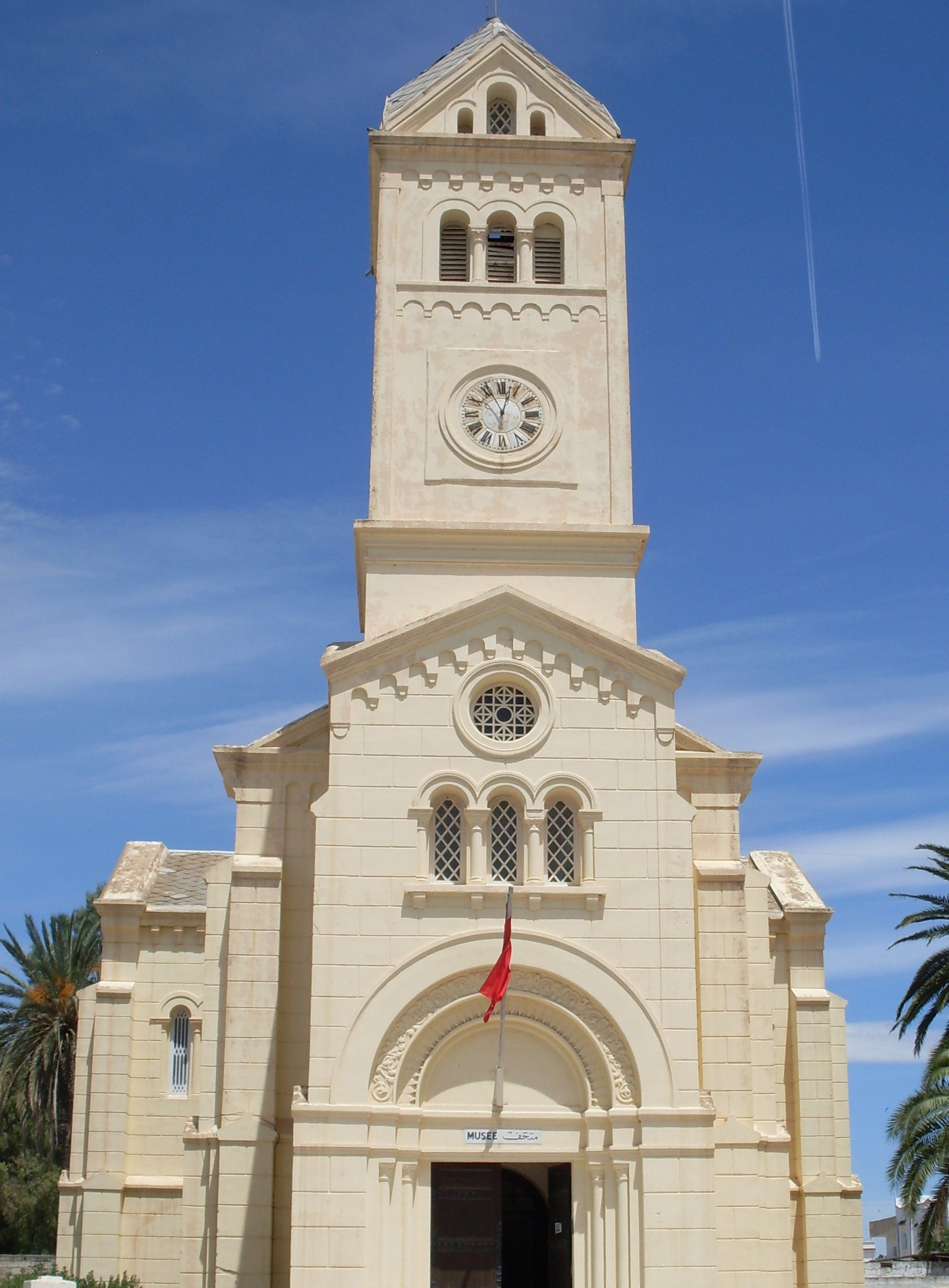 Musée d'Enfidha Tunisie